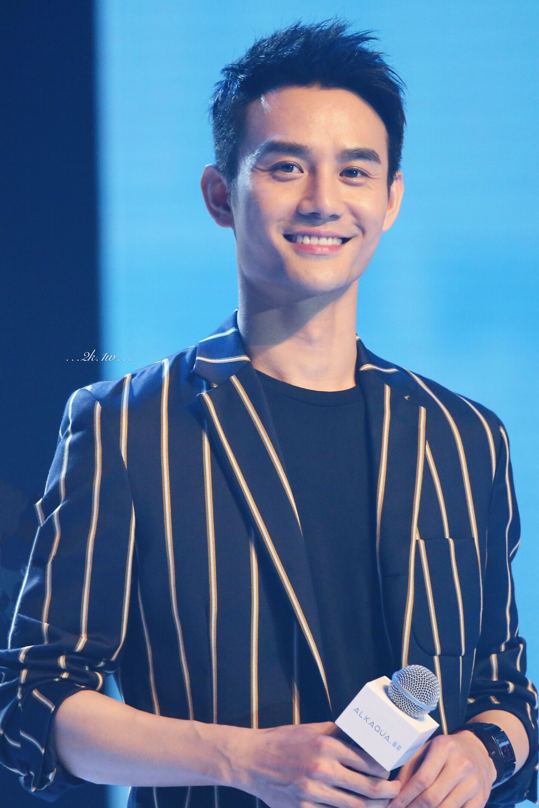 2017年8月24日上海統一愛夸品牌活動日